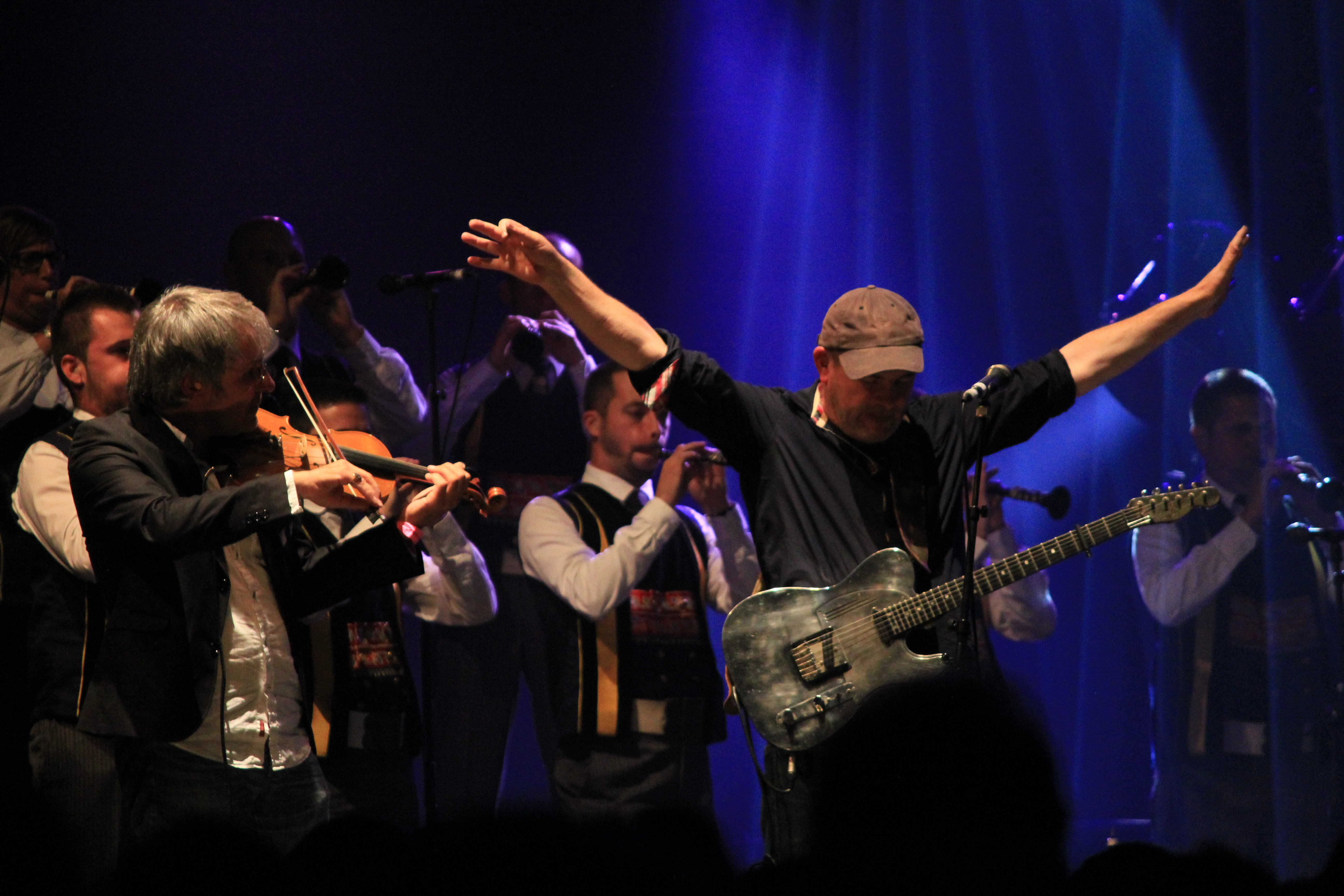 Concert de Red Cardell et du Bagad Kemper lors du festival interceltique de Lorient.